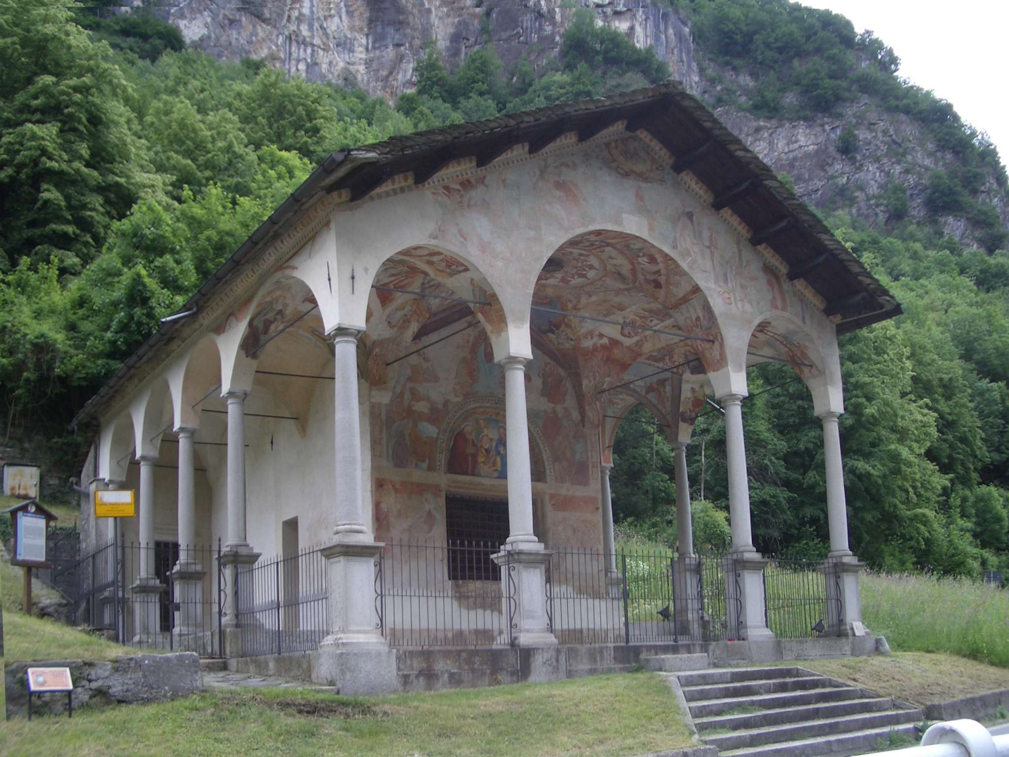 Photo of chapel Madonna di Loreto (XVI century), Roccapietra, Varallo Sesia (VC), Italy